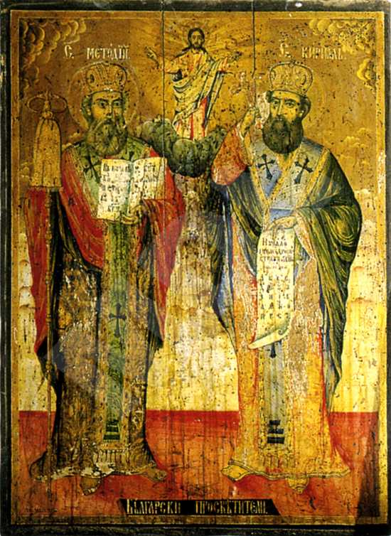 Св. св. Кирил и Методий